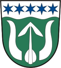 Omlenice